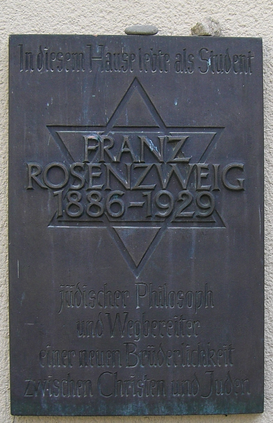 Franz Rosenzweig (* 25. Dezember 1886 in Kassel; † 10. Dezember 1929 in Frankfurt am Main) war ein deutsch-jüdischer Historiker und Philosoph. Gedenktafel an seinem Freiburger Wohnhaus.